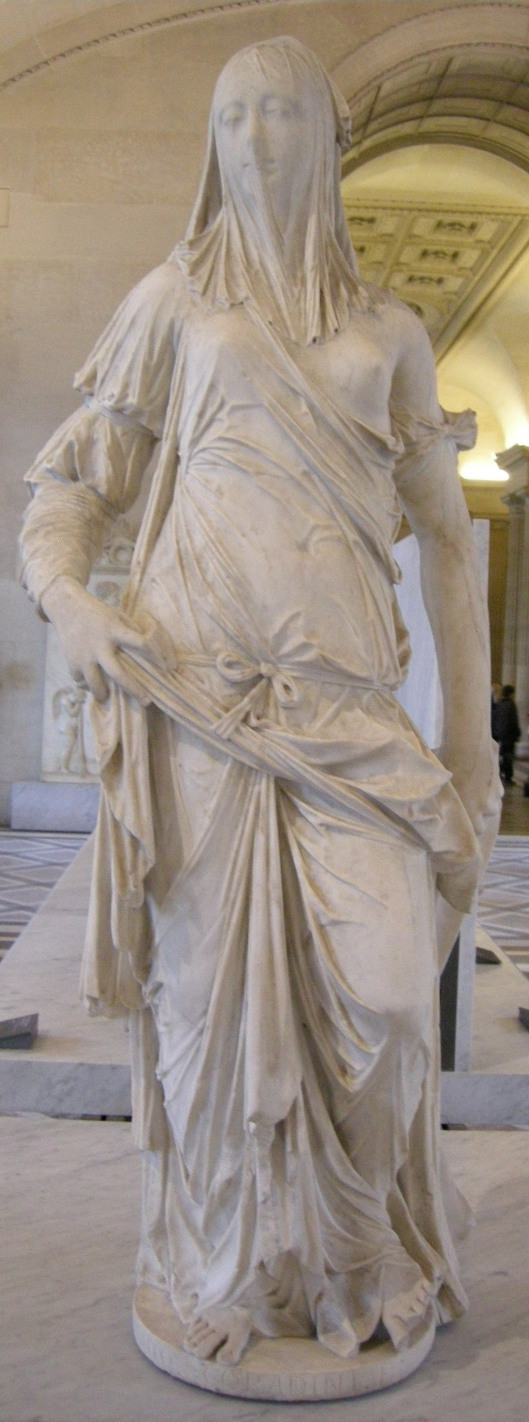 Donna velata (la fede)